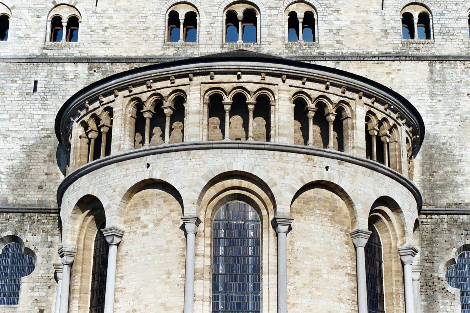 Belgique - Brabant wallon - Nivelles - Collégiale Sainte-Gertrude